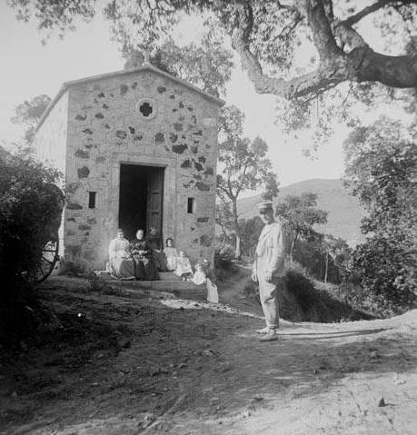 Imatge